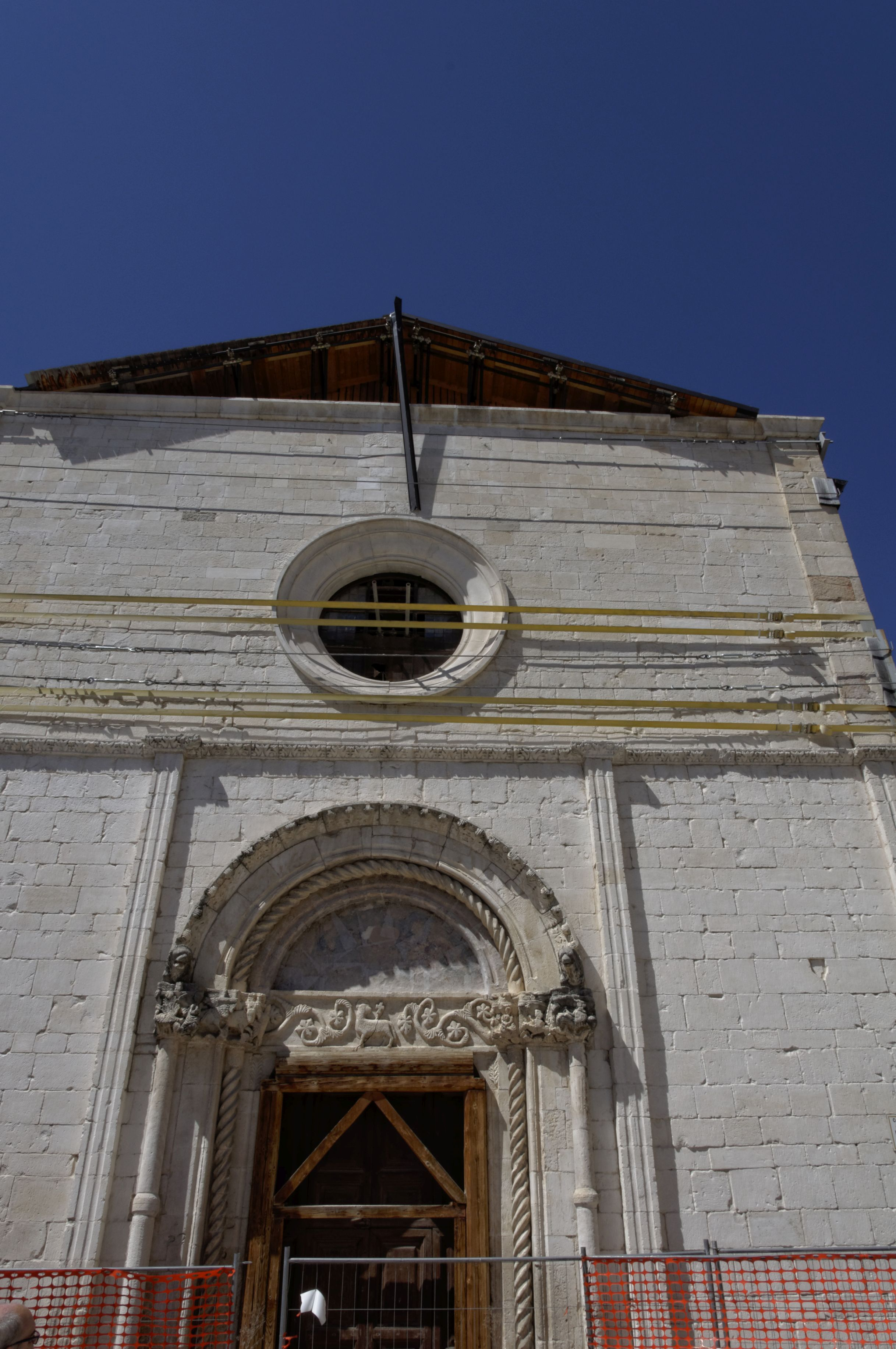 L'Aquila 2017 Dieses Foto entstand in Zusammenarbeit mit Stadtbesichtigungen.de Die Seiten Stadtbesichtigungen.de, der dazugehörige Reise Blog sowie die Facebookseite: Stadtbesichtigungen Rom dürfen dieses Bild für Ihre Veröffentlichungen ohne den Hinweis auf Wikipedia, Commons bzw der Lizenz verwenden. Die Verantwortlichen habe von mir (Ra Boe) die Originaldaten zur freien Verfügung übermittelt bekommen.